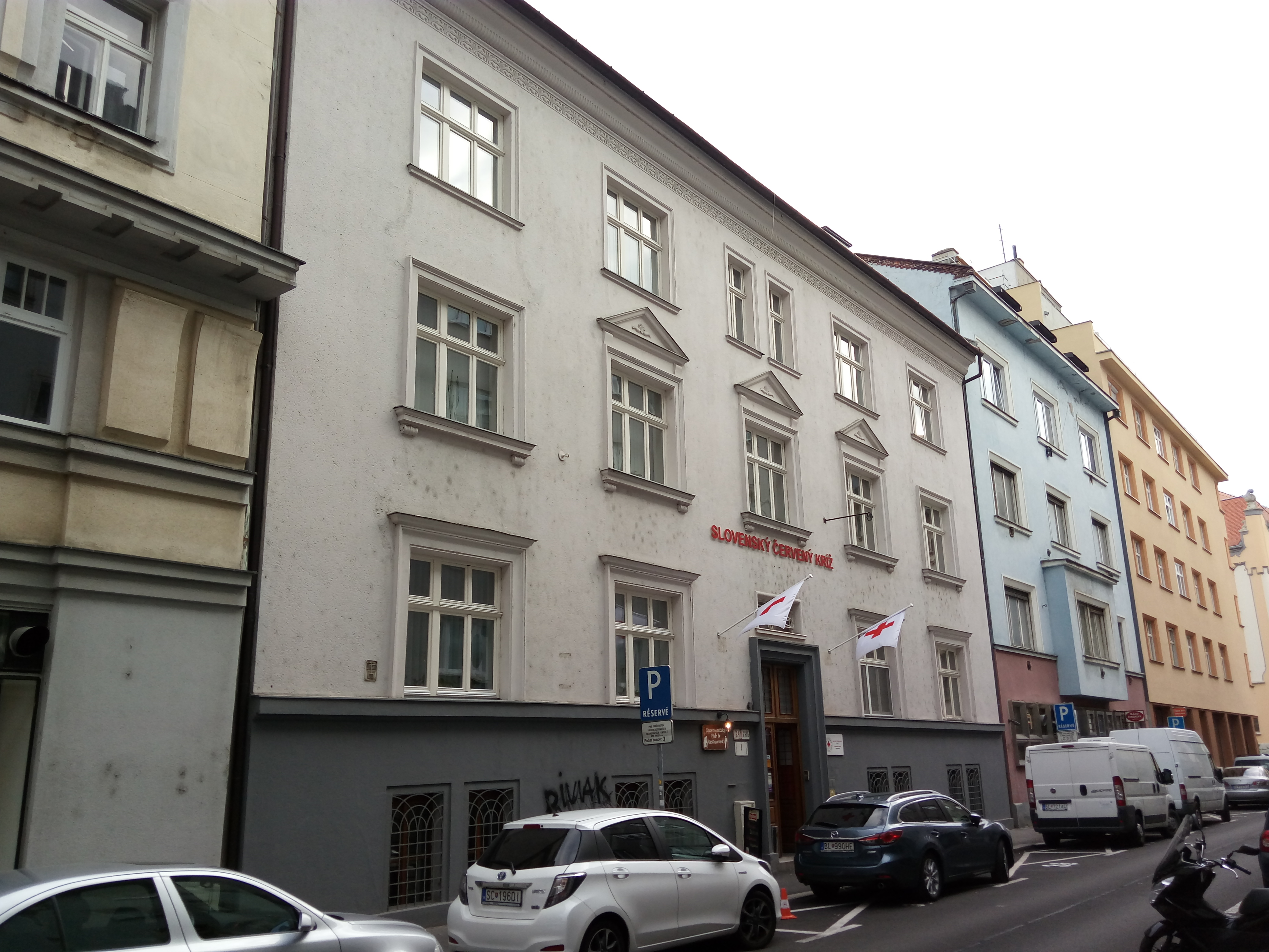 Grosslingová 24, Staré Mesto, Bratislava